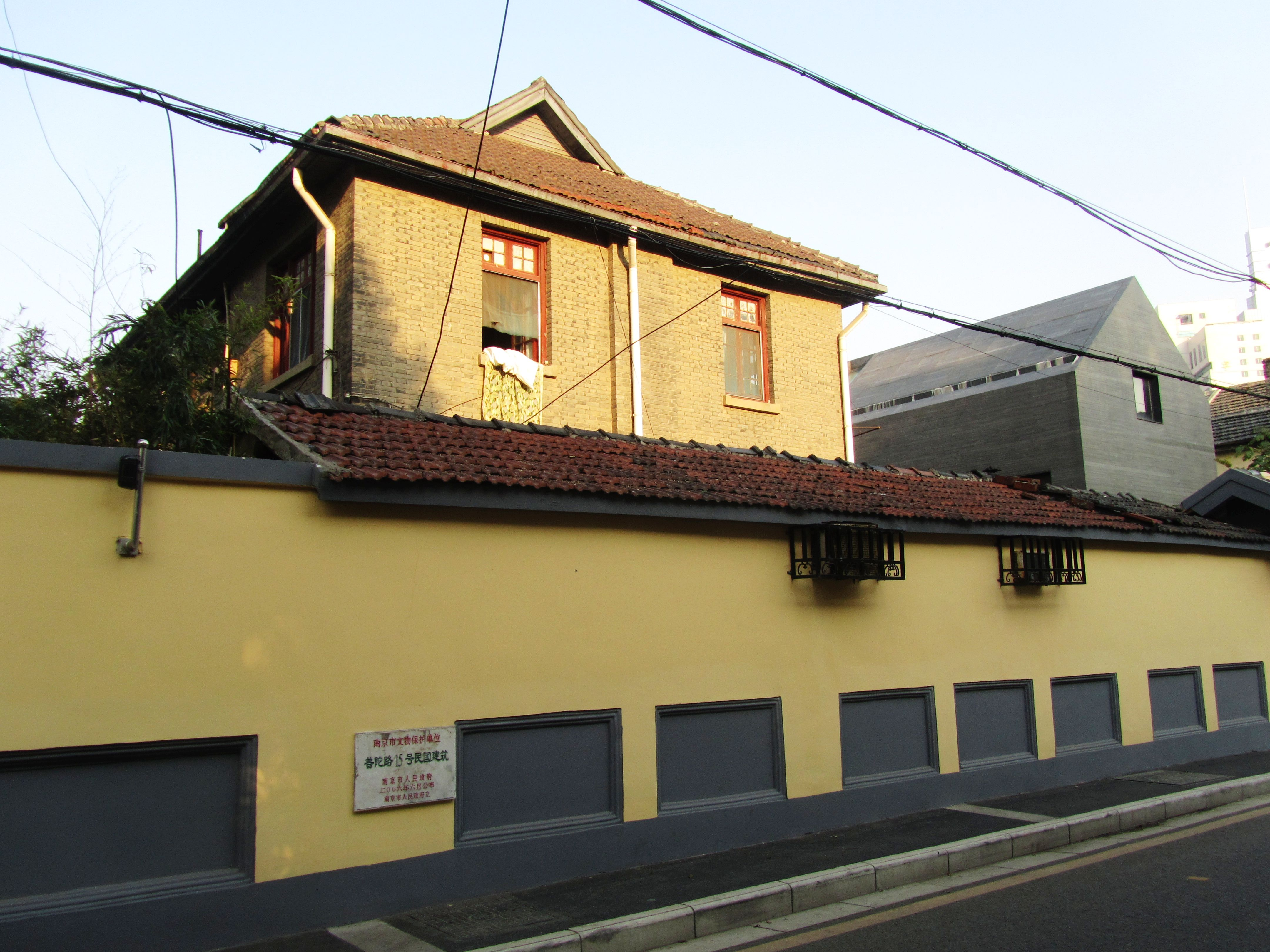 颐和路公馆区——普陀路15号民国建筑，原蒋纬国公馆。